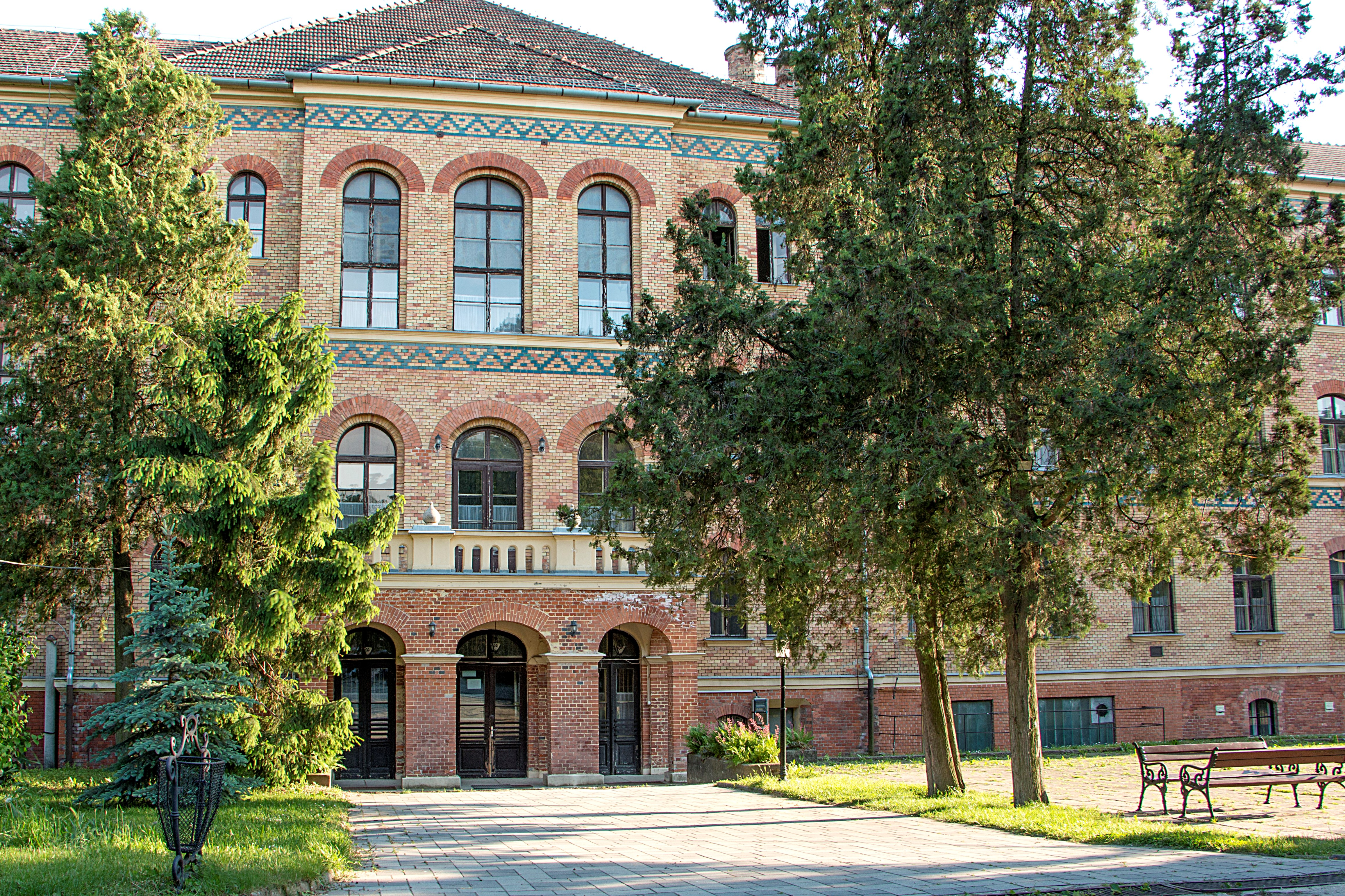 A Szerb Antal Gimnázium lépcsőház-bejárata a parkból